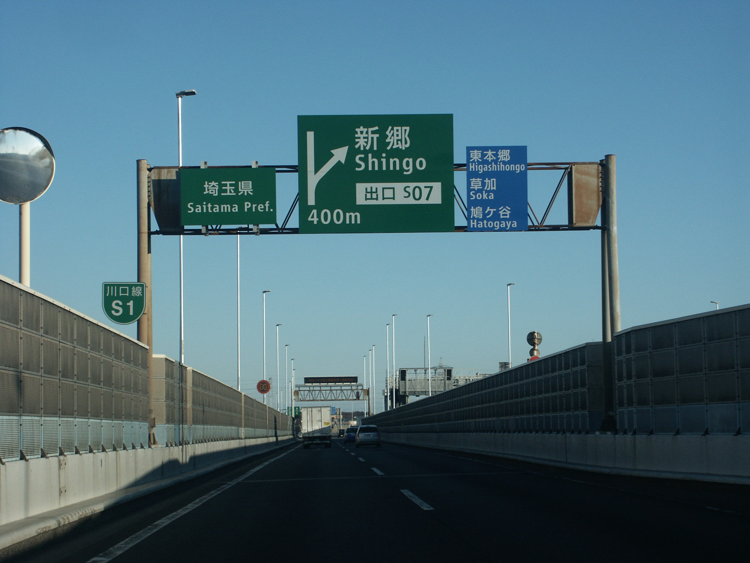 首都高速道路川口線下り新郷出口付近